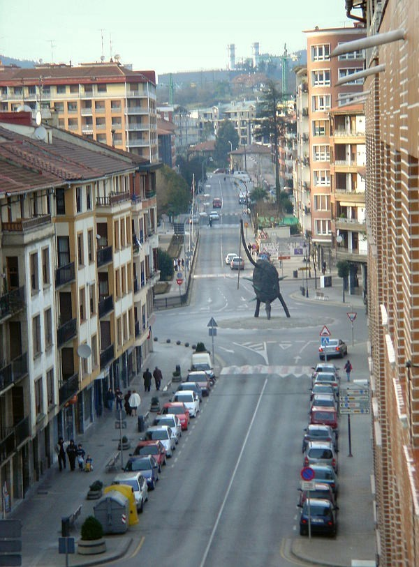 Zornotzako ikuspegia